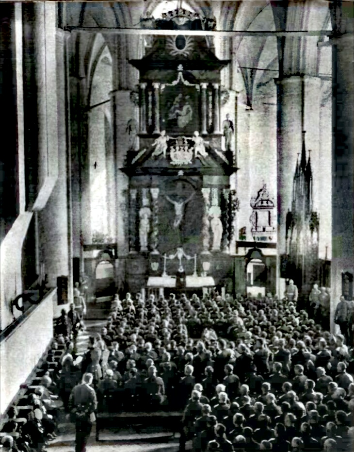 Pastor Aereboe vereidigte abteilungsweise die Rekruten auf den Degen des Adjutanten. Ummalt wurde die Veranstaltung durch den Chor des Chores und die Kapelle der Schutzmannschaft. Zum Abschluss nahmen sie das gemeinsame Abendmal ein.